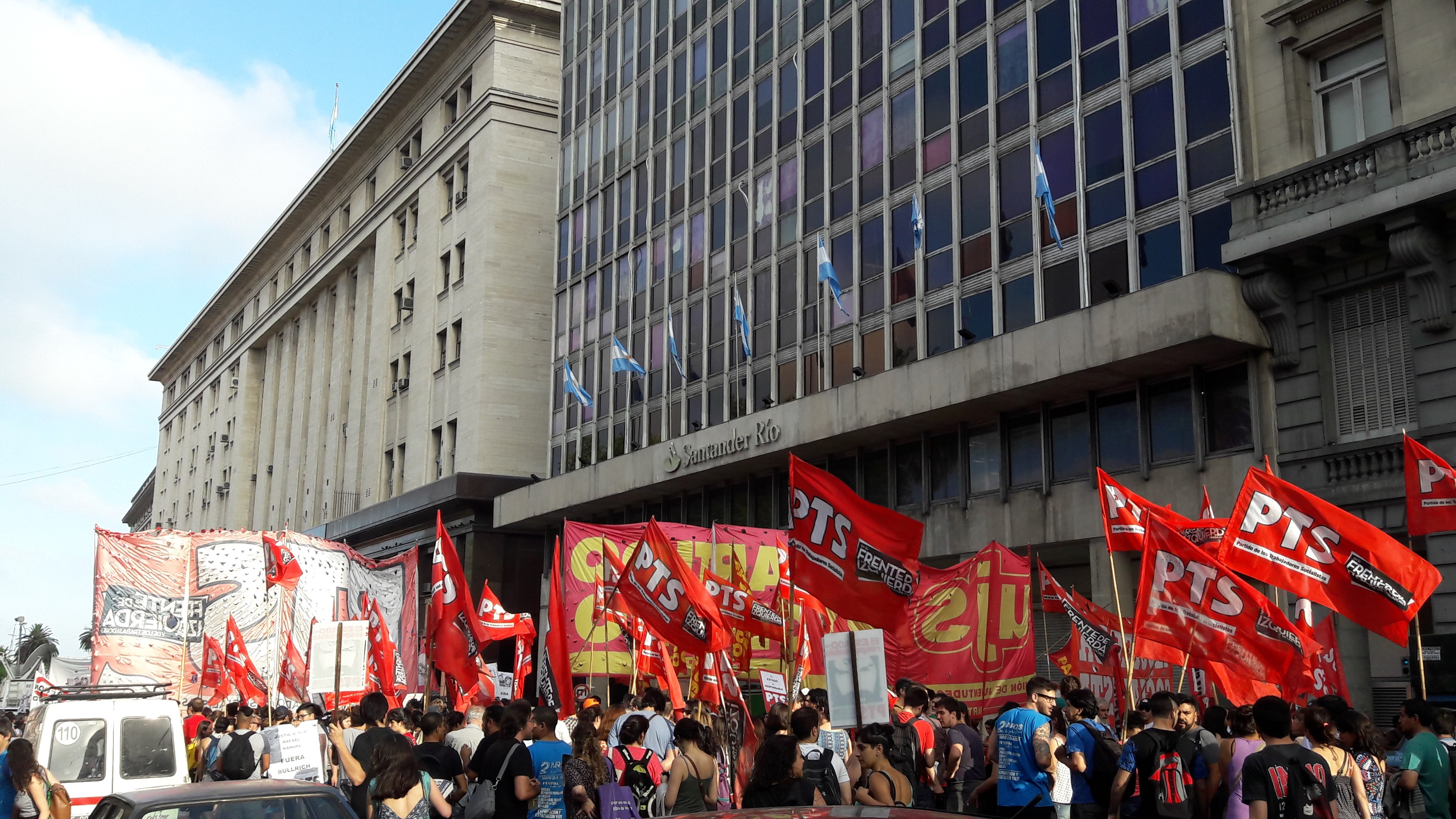 Marcha de la Resistencia 2017, Plaza de Mayo, Buenos Aires, Argentina.